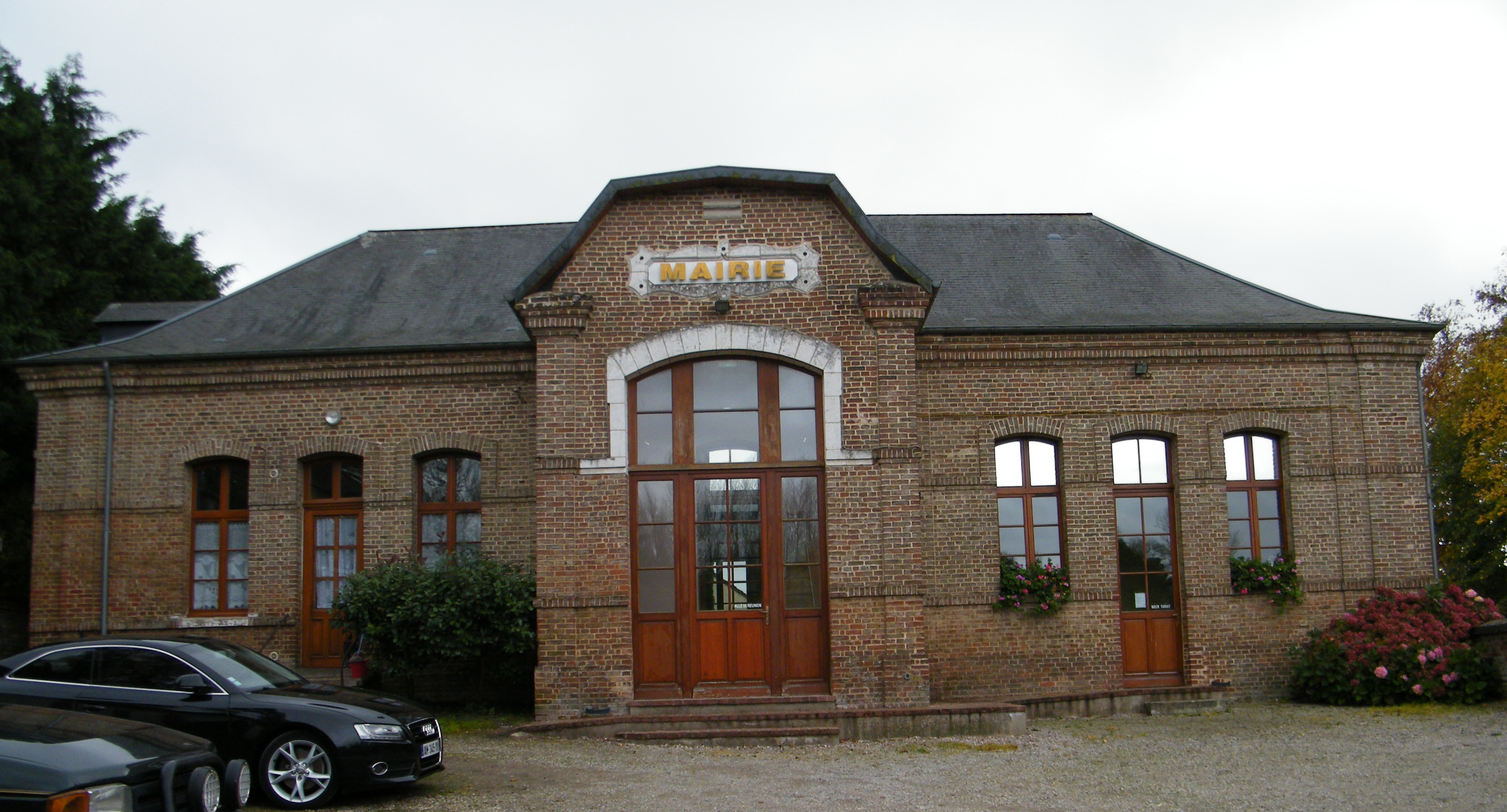 Gapennes, Somme, mairie